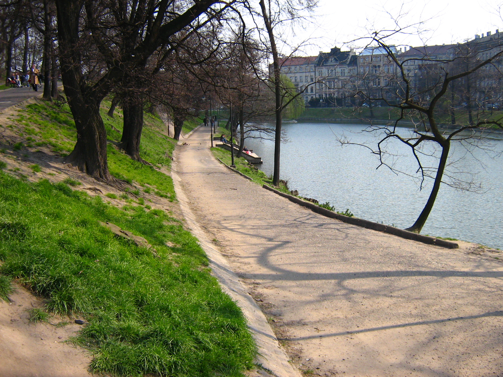 Fahrradweg. Stadtgraben an der Liebichshöhe (undatiert, vor April 2007), Breslau, Niederschlesien, Polen.